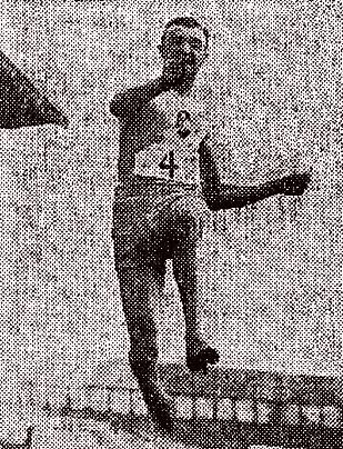 Robert Paul bat le record de France de saut en longueur avec 7m50 (octobre 1932, match France- Finlande à Colombes+).